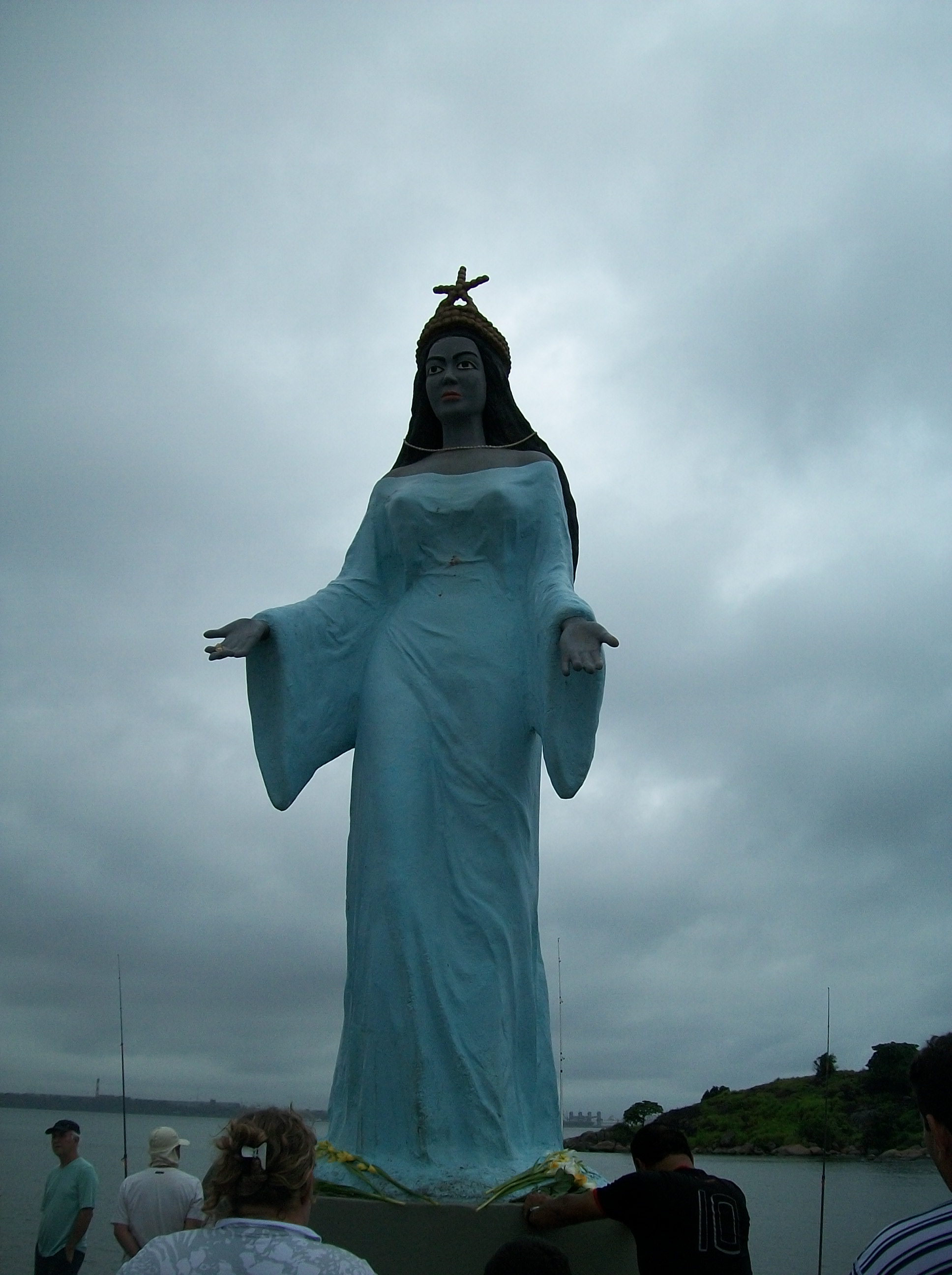 Praia Camburi - Pier Iemanja - VITÓRIA - ES